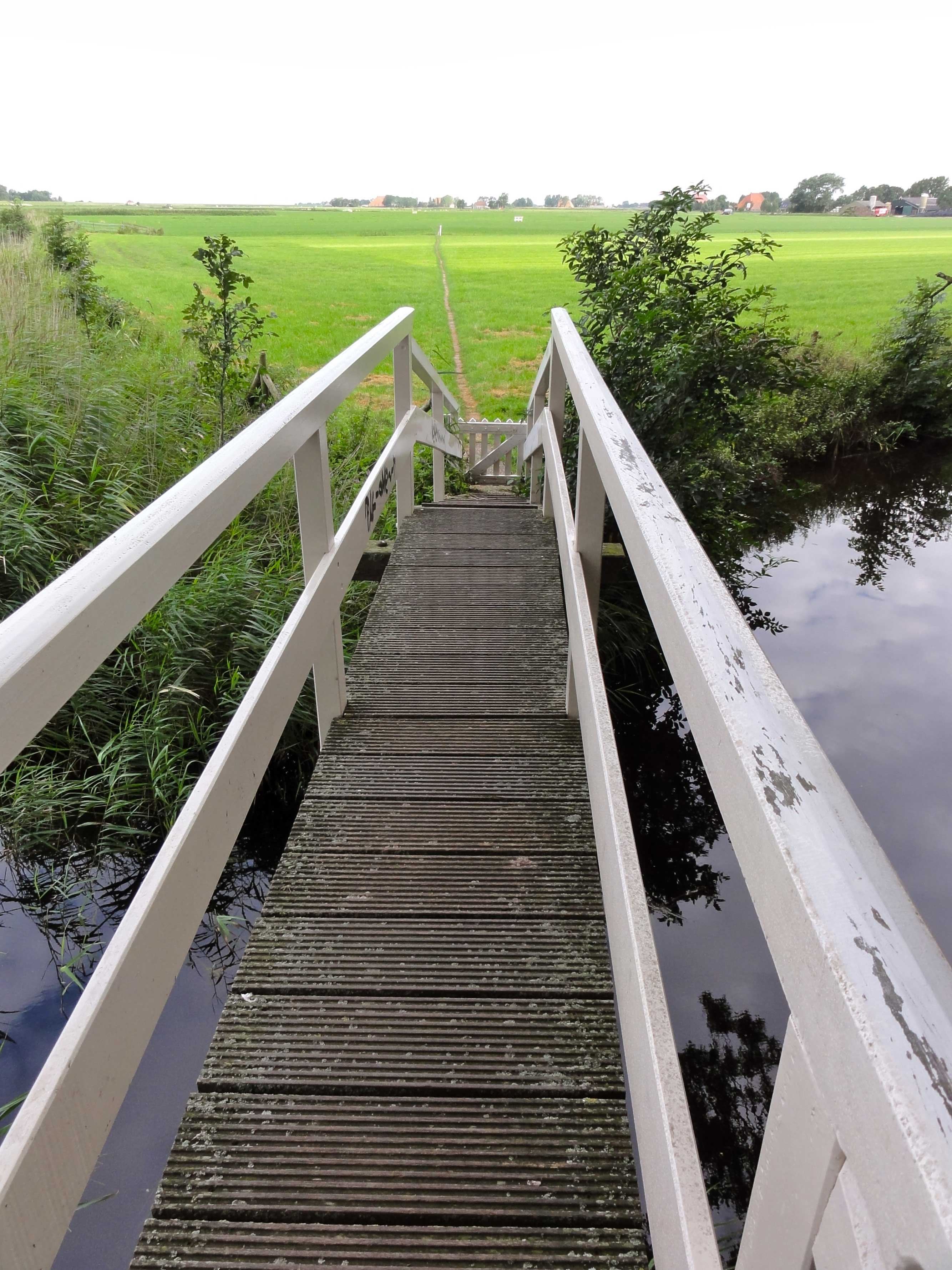 De Tillefonne, een eeuwenoud kerkenpad naar de Grote of Sint-Gertrudiskerk van Workum